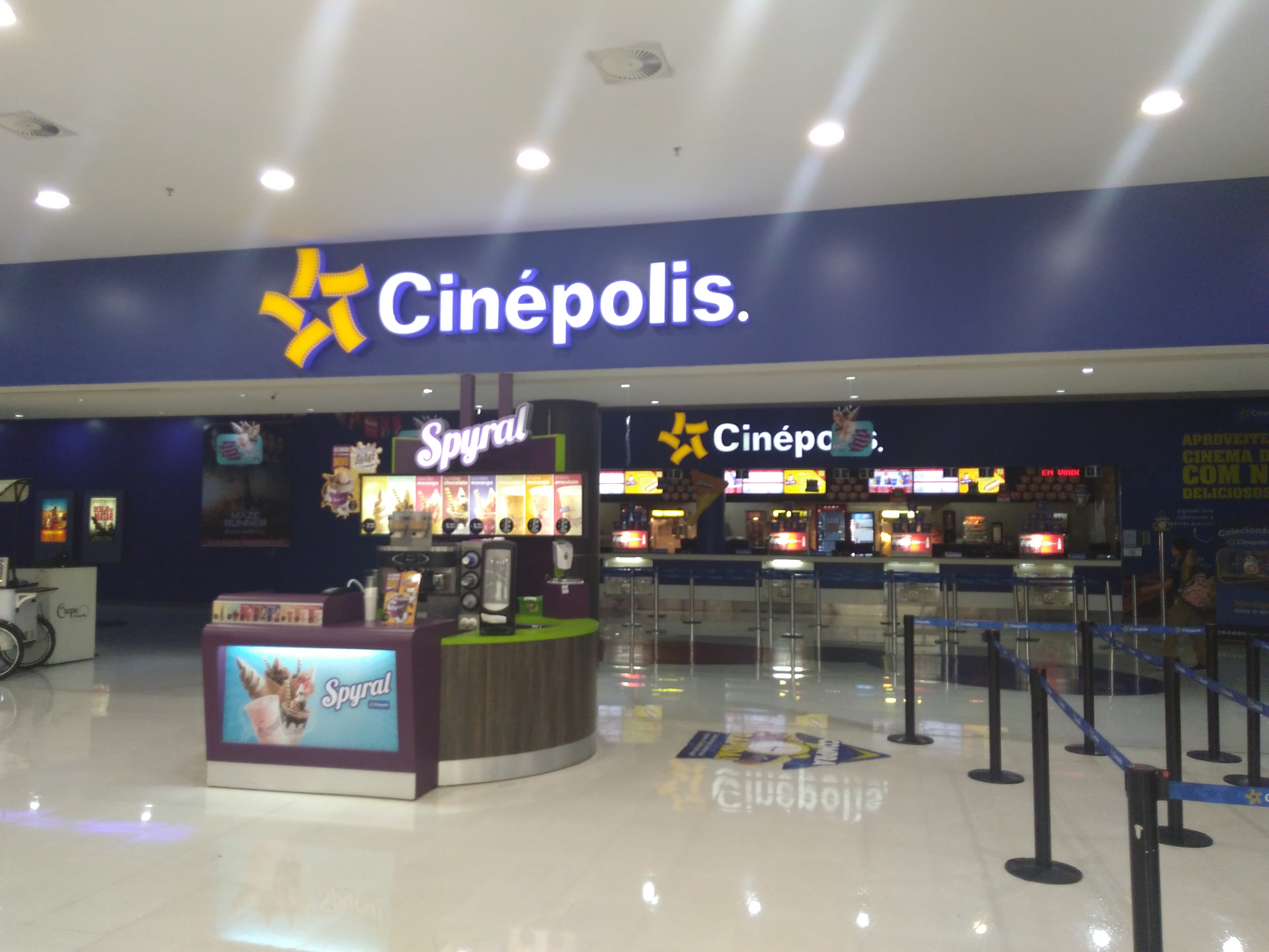 Fachada do Cinépolis Metrô Itaquera, de São Paulo, SP